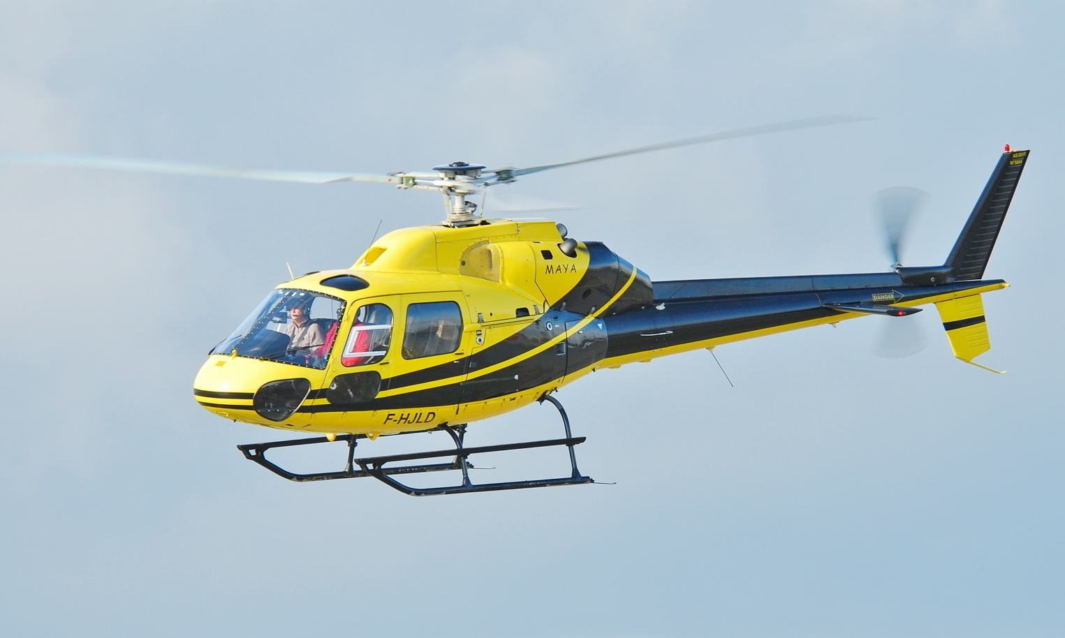 Photo prise à l'aéroport de Toulouse-Blagnac (LFBO) en France. Picture take at Toulouse-Blagnac Airport (LFBO) in France.